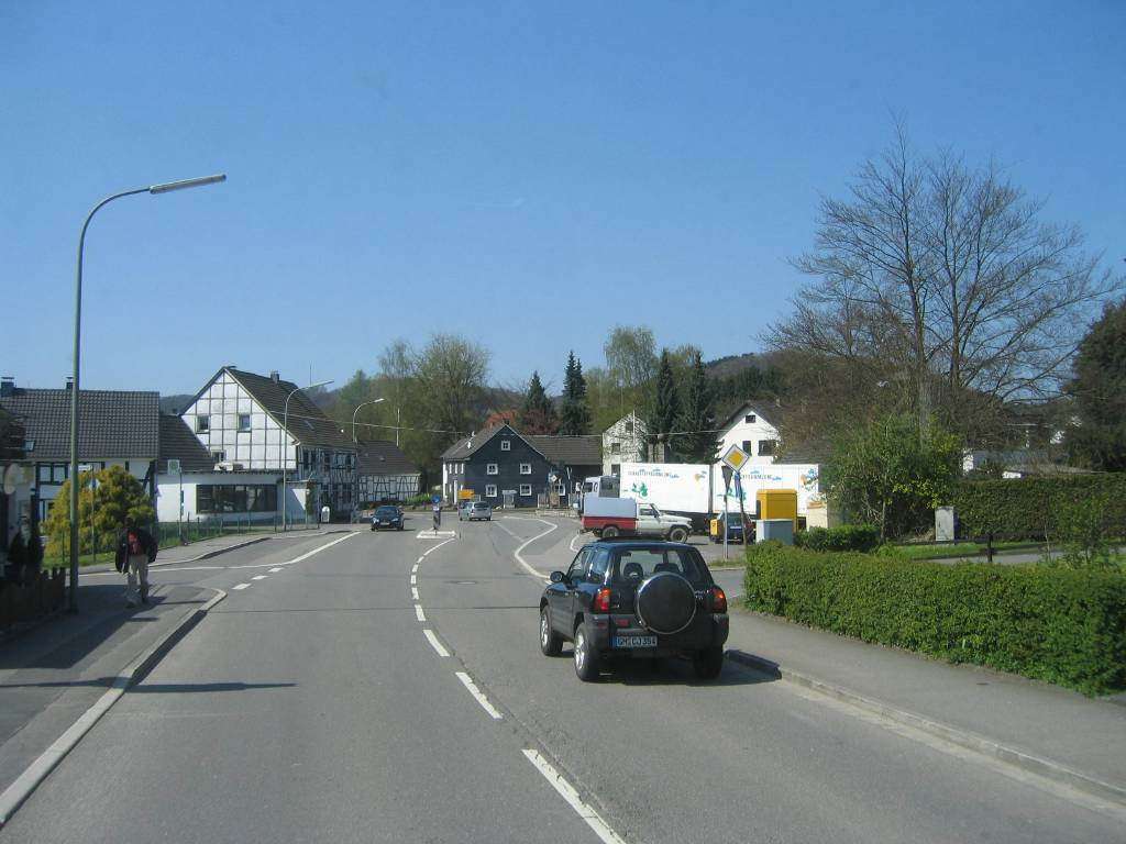 Lindlar Hartegasse, April 2005